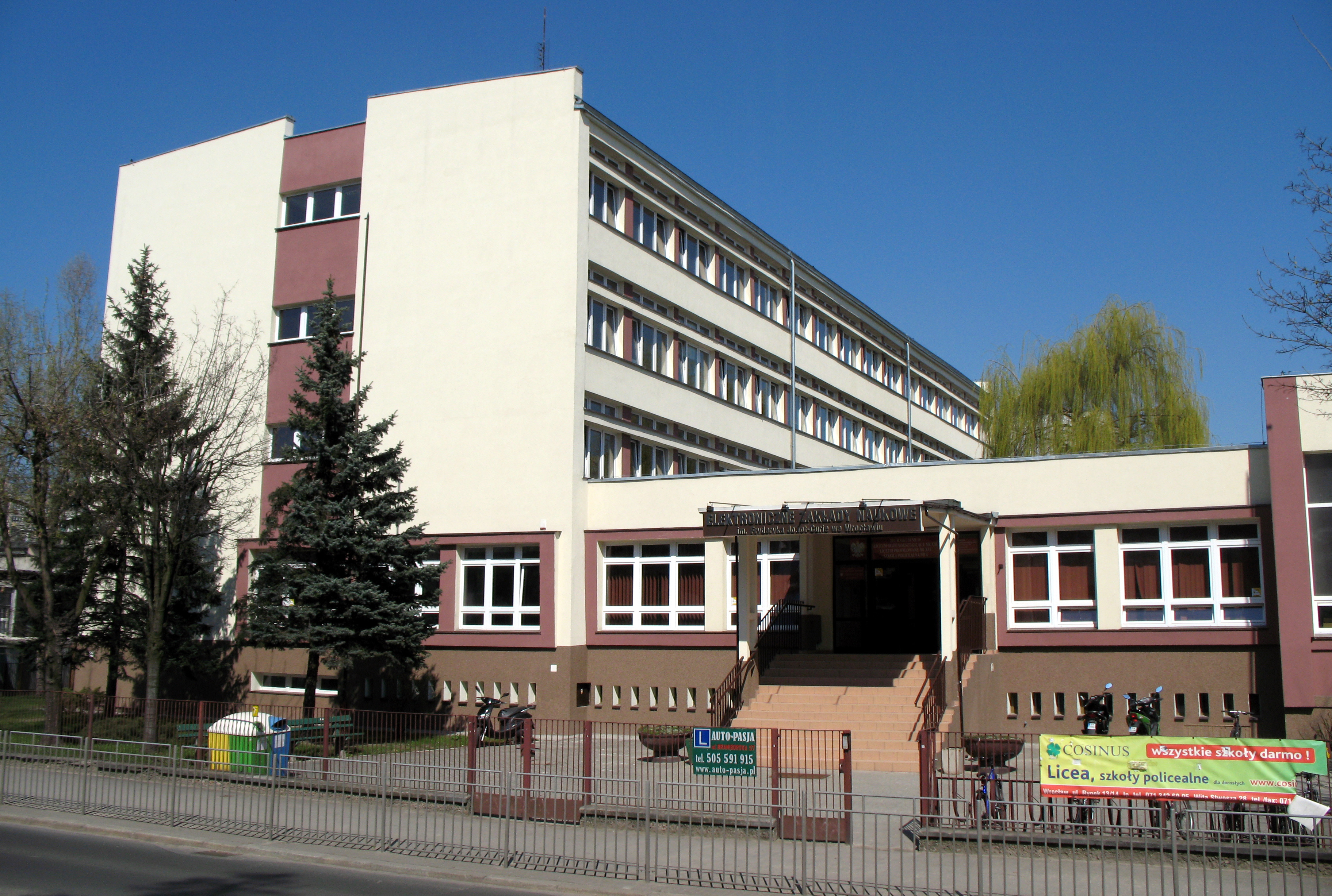 Wrocław, Elektroniczne Zakłady Naukowe, zespoł szkół (LO nr XXI, Liceum Profilowane nr 16, Technikum nr 10), ul. Braniborska 57